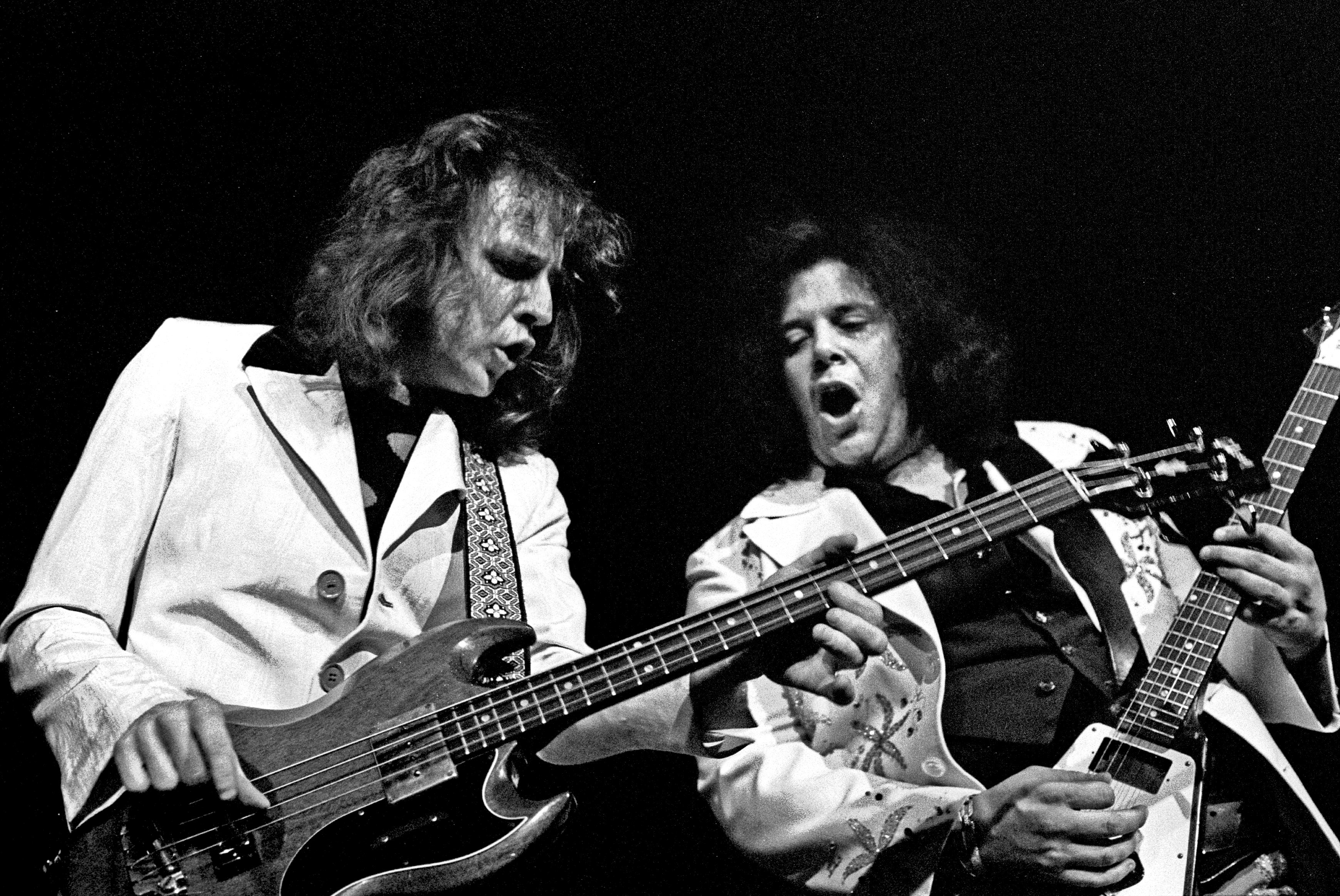 West, Bruce & Laing 1404730017 Gescheiterter Anlauf zur Installation einer neuen "Supergroup", aber gute Musik: West, Bruce & Laing, Musikhalle Hamburg, April 1973: Hier Jack Bruce und Leslie West Jack Bruce and Leslie West together, performing as a power trio: West, Bruce & Laing